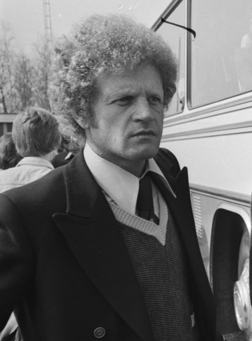 L'entraîneur de l'AS Saint-Étienne Robert Herbin, en 1976